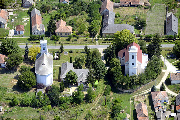 Mezőkomárom légi fotó